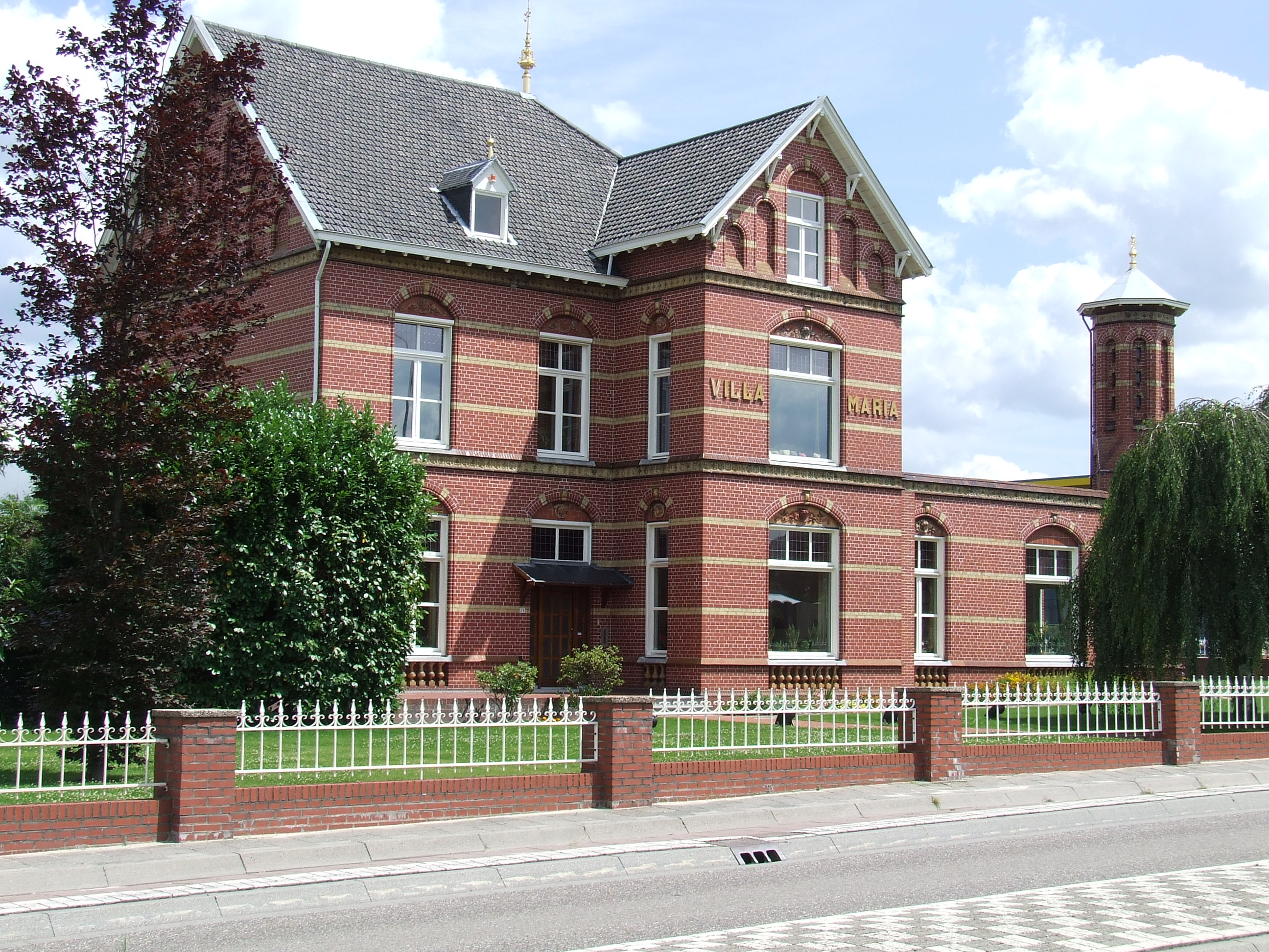 Foto van Villa Maria in Tegelen